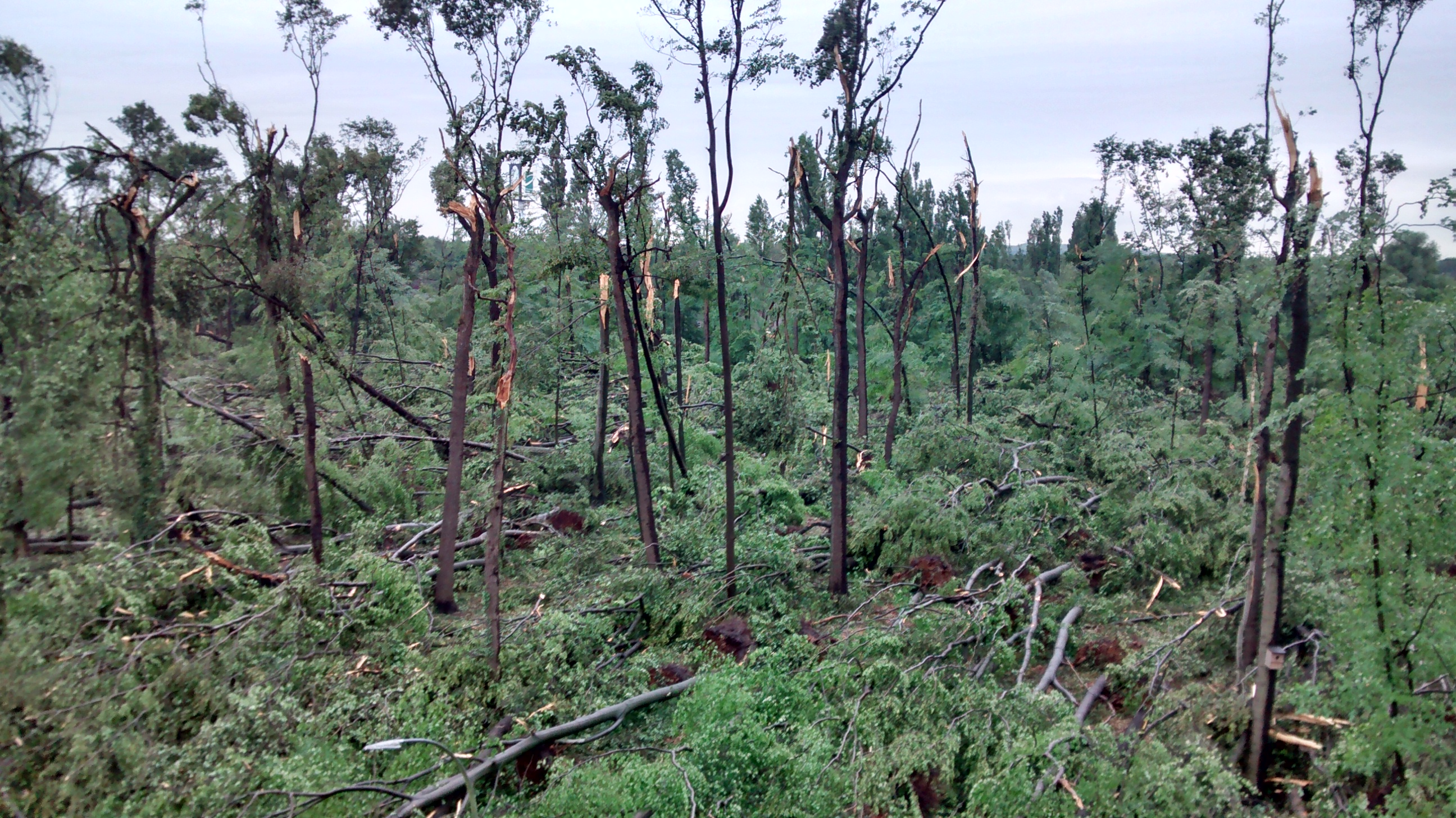 Das "LANUV"-Wäldchen in Recklinghausen zwei Tage nach dem Sturm Pfingstmontag 2014 (Tiefdruckgebiet Ela)